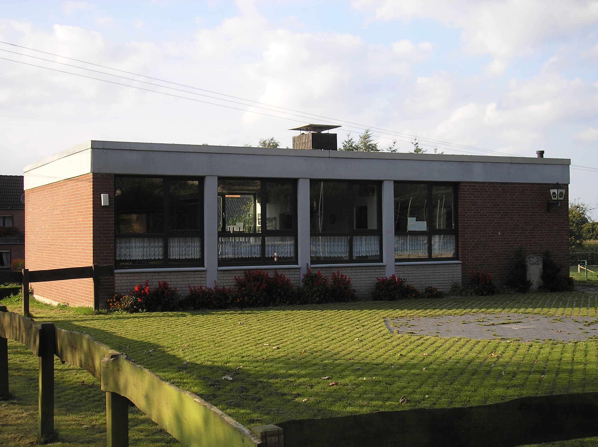 Das ehemalige Schulgebäude von Kranenburg-Grafwegen, das heute als Dorfgemeinschaftshaus dient.